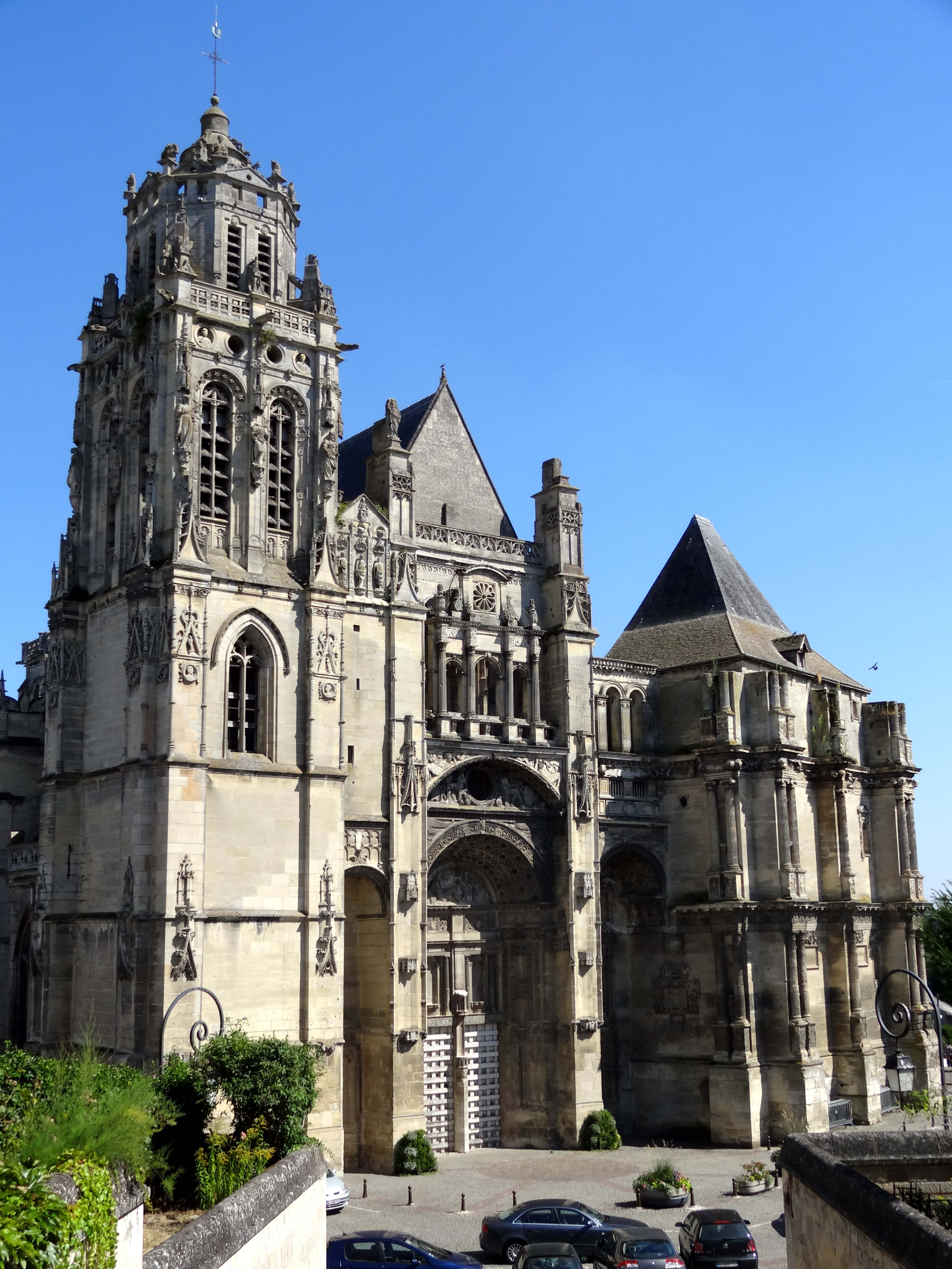 Collégiale Saint-Gervais-Saint-Protais - voir titre.